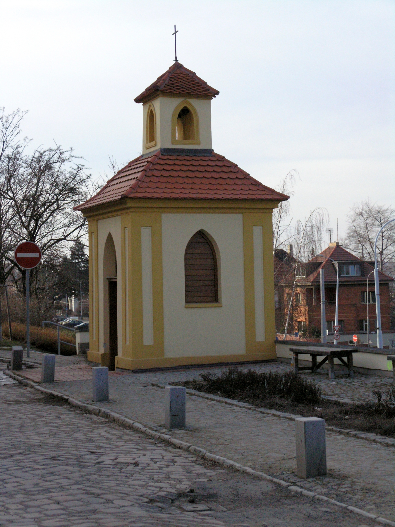 Praha, Střešovice - zvonička